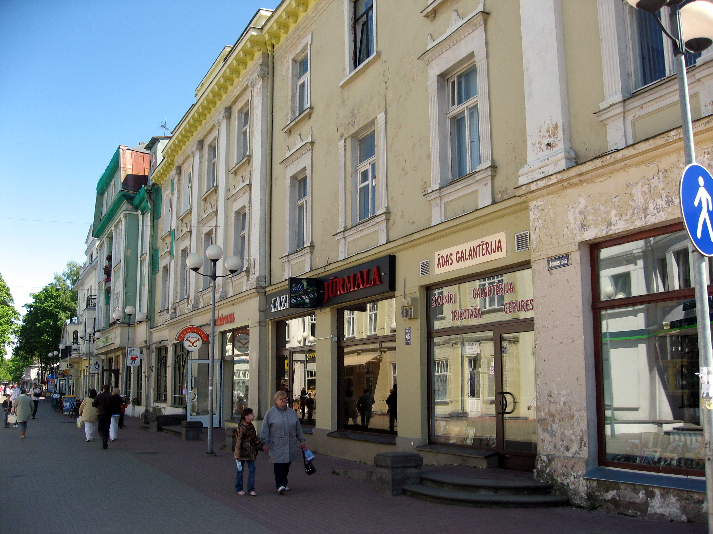 Jūrmala